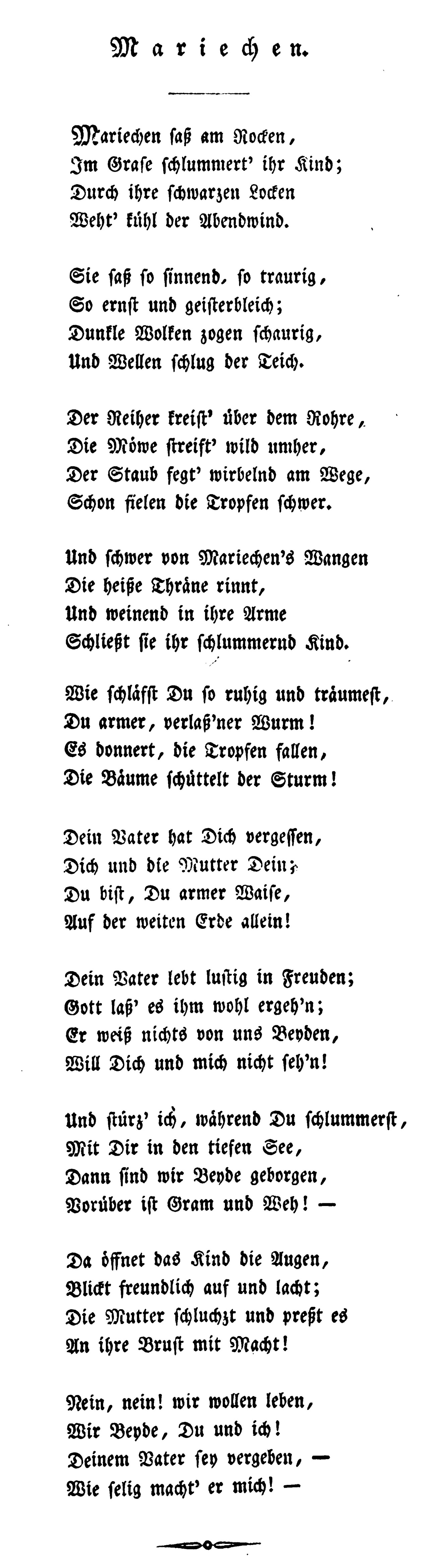 Joseph Christian von Zedlitz: Mariechen saß am Rocken (1832), Grundlage des Küchenlieds Mariechen saß weinend im Garten